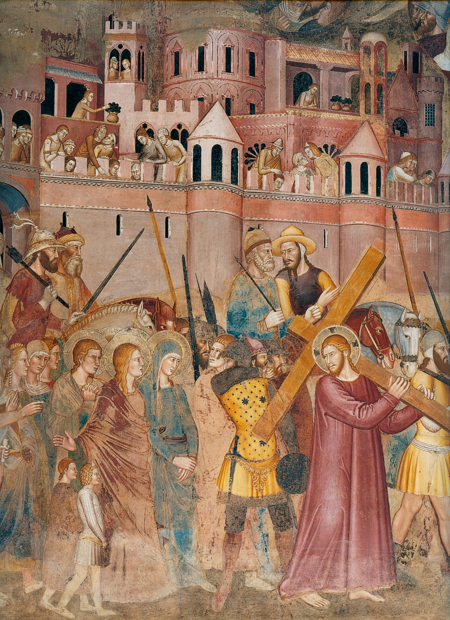 Andrea_di_Bonaiuto._Santa_Maria_Novella_1366-7_fresco_0008